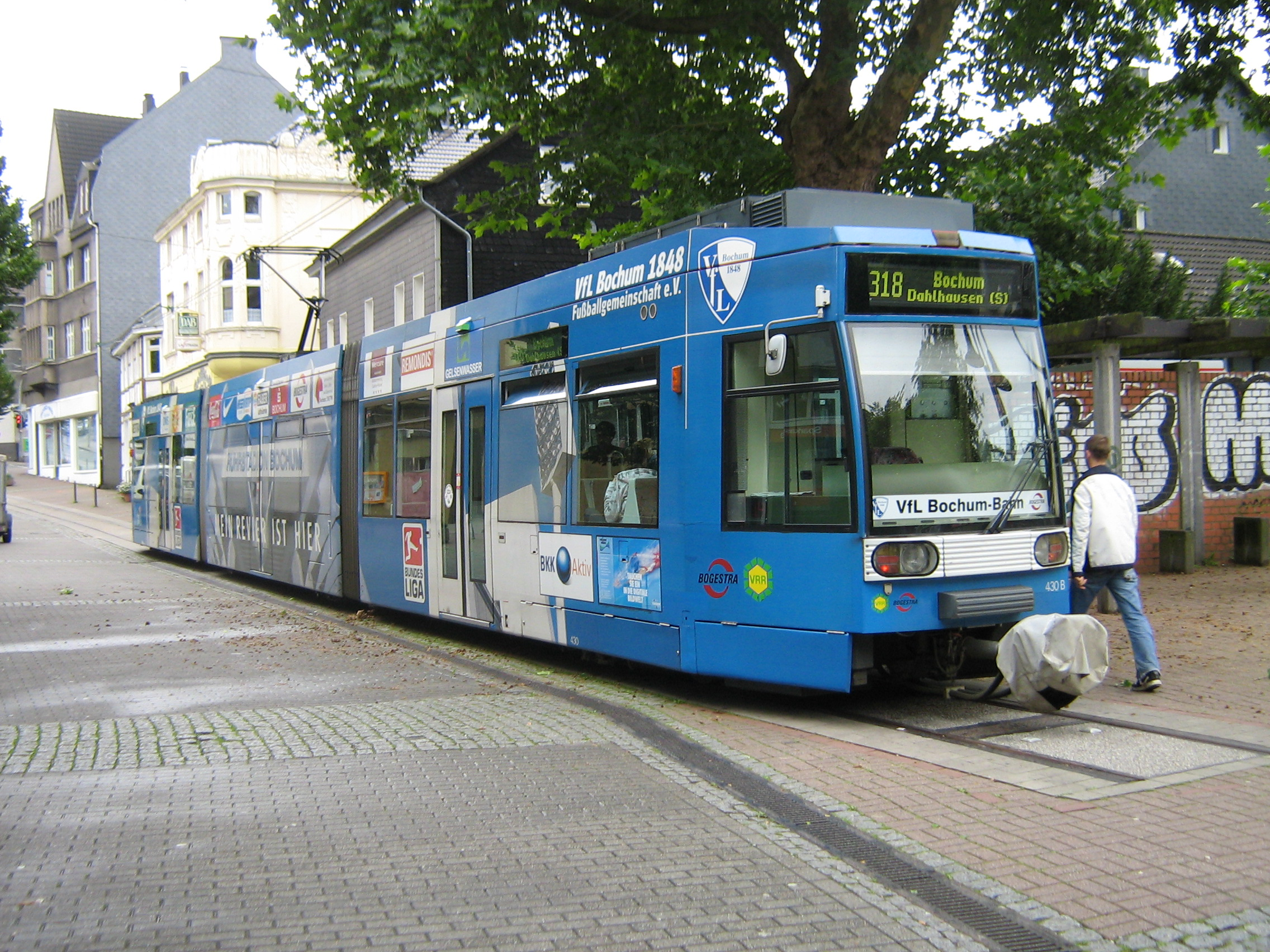 Straßenbahn der Linie 318 in Bochum-Dahlhausen an ihrer Endhaltestelle